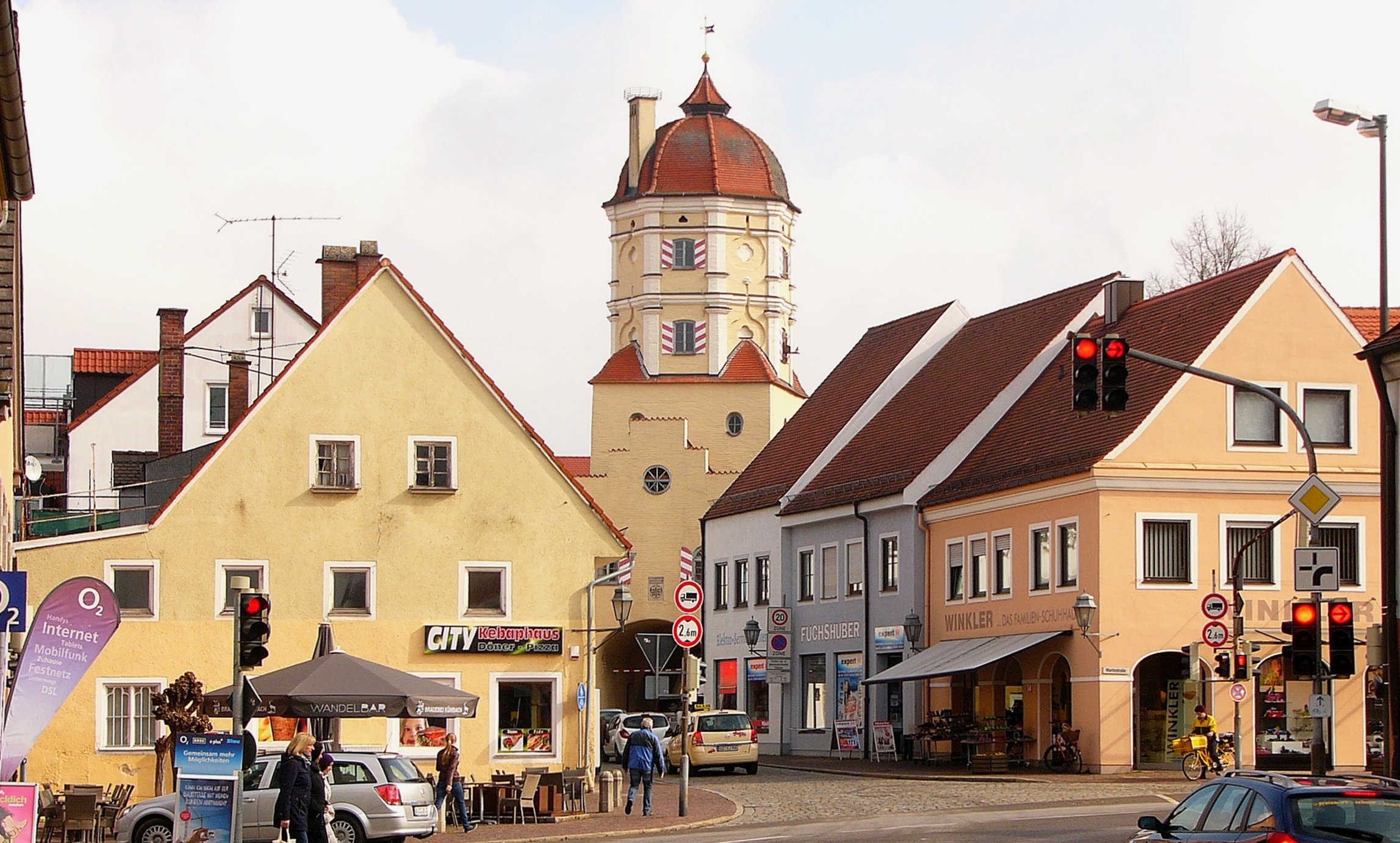 Ensemble Werlberger Straße. Die Häuser der Werlberger Straße bilden die Verlängerung des Stadtplatzes über das Obere Tor hinaus. Der in Anlehnung an die ursprüngliche Form neu errichteten Baugruppe auf der Ostseite steht eine Reihe schlichter zweigeschossiger Wohnhäuser gegenüber, zum Teil mit vorstehenden Dächern zur Straße hin. Die Gebäude der Westseite stammen aus der Zeit um 1800 und später. This is a photograph of an architectural monument.